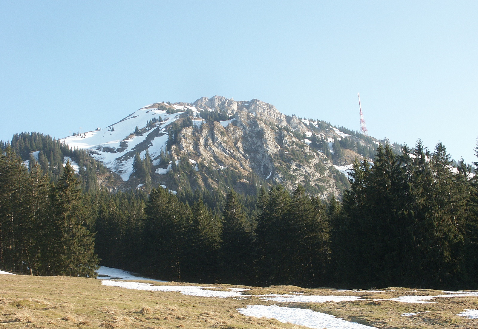 Grünten - a mountain in germany